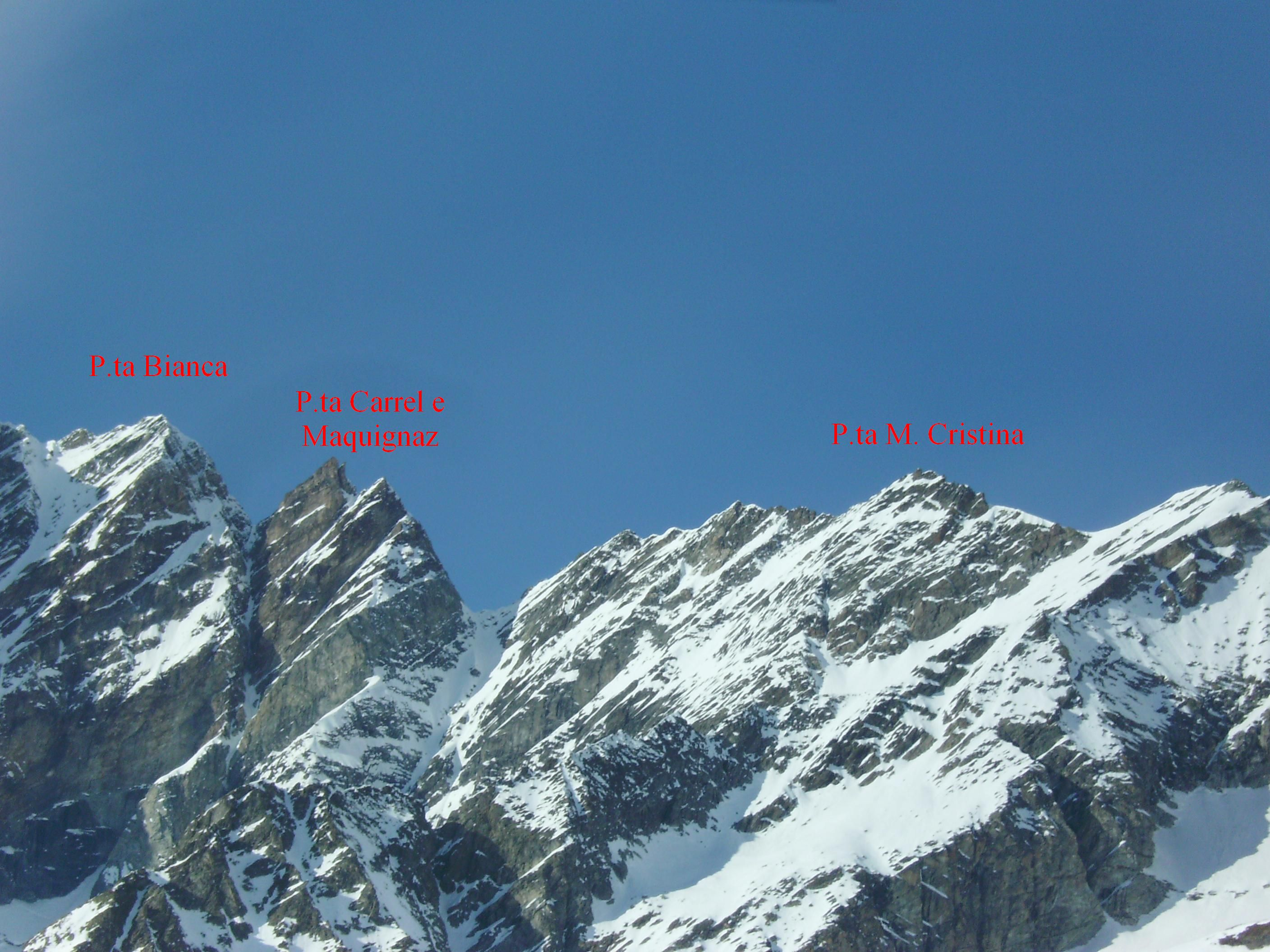 P.ta Bianca + P.ta Carrel + P.ta Maquignaz + P.ta M. Cristina - Valle d'Aosta